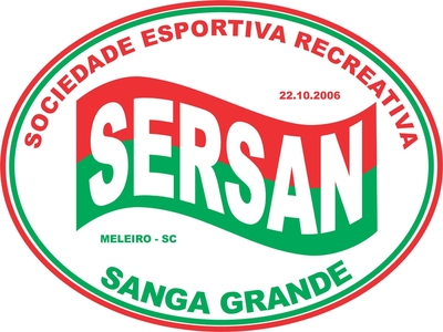 simbolo do clube de futebol sersan de sanga grande